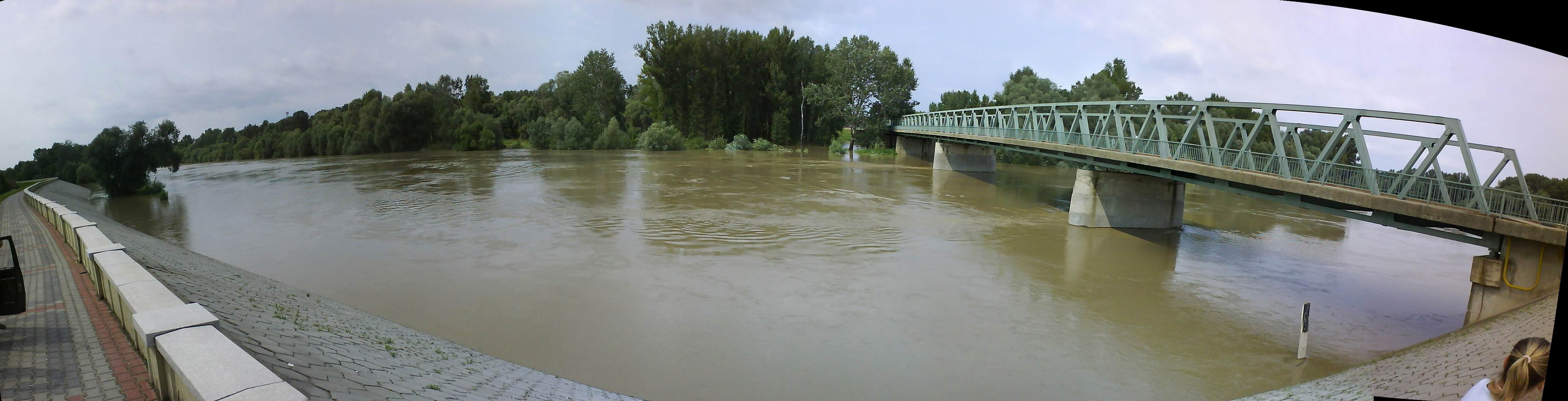 Tisza river in Kisar 2008.07.26.